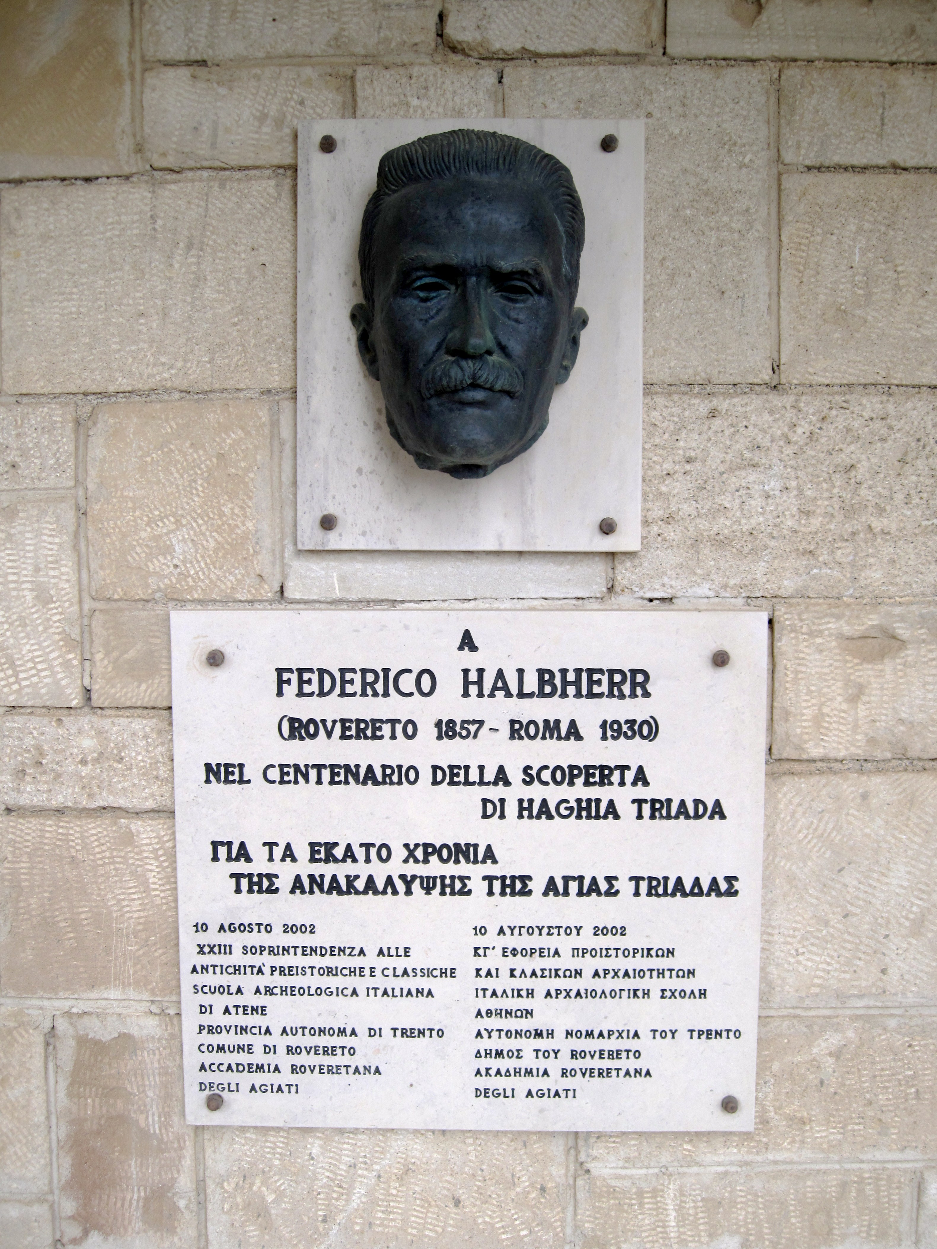 Gedenktafel an den Archäologen Frederico Halbherr in der Ausgrabungsstätte von Agia Triada in der Gemeinde Festos, Regionalbezirk Iraklio, Kreta, Griechenland